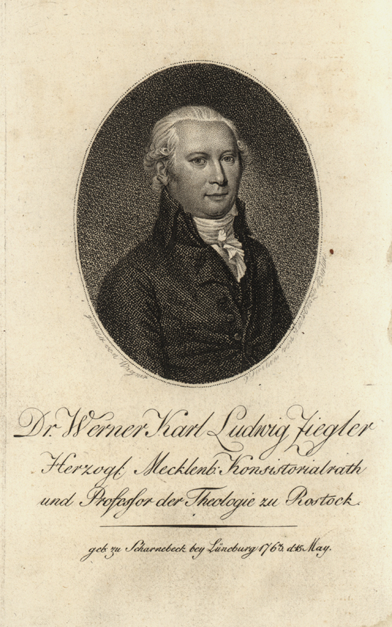 Porträt des Theologen Werner Karl Ludwig Ziegler (1763-1809)